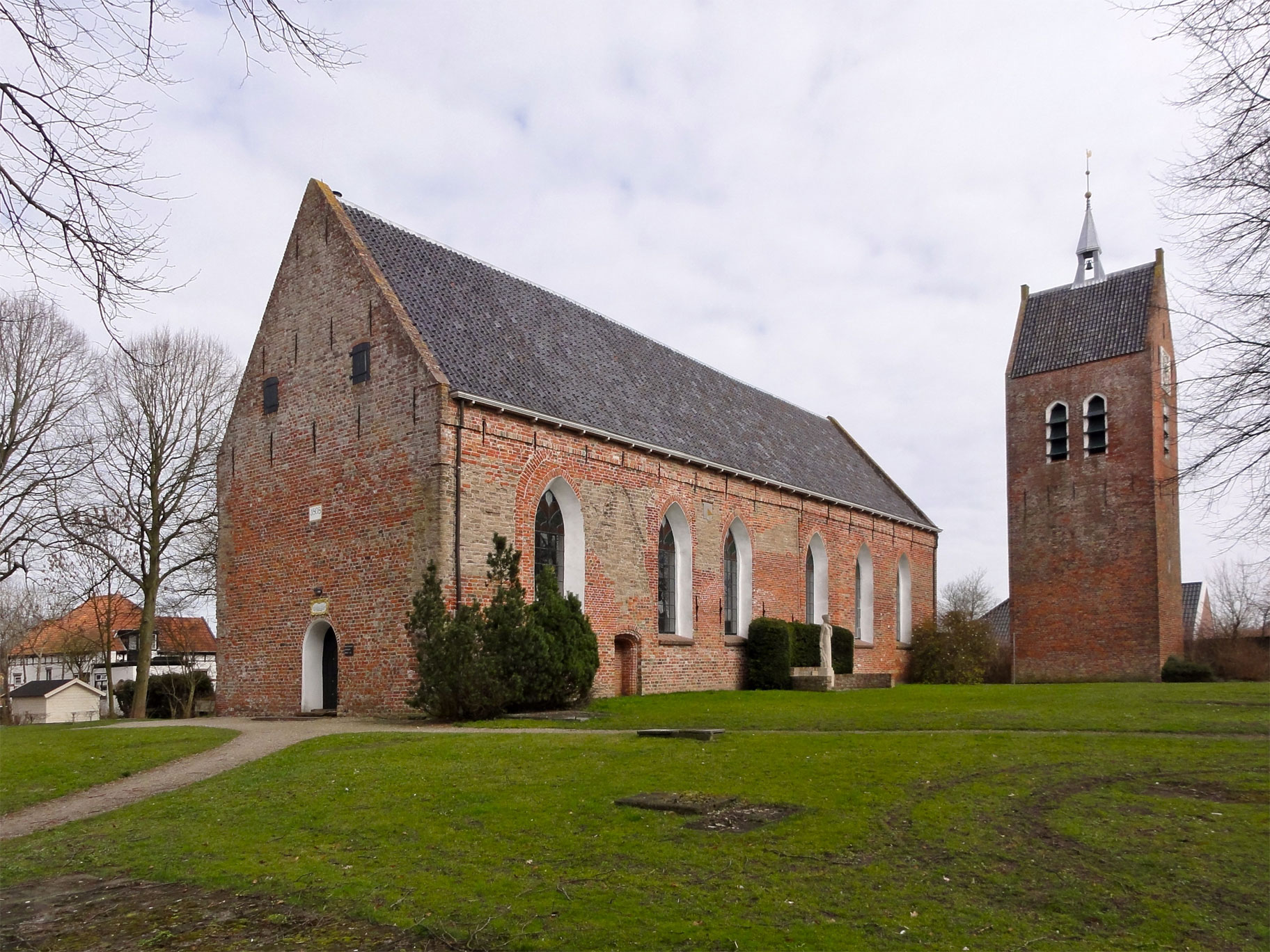 Sint-Laurentiuskerk van Baflo